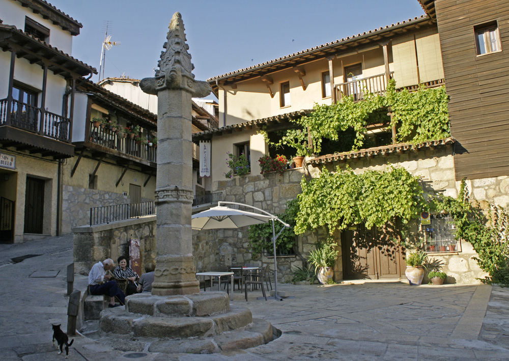 Se muestra la plaza donde se encuentra la Picota de Valverde de la Vera.